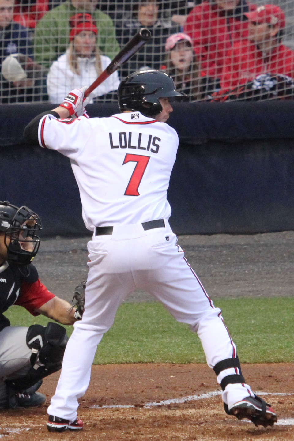 Ryan Lollis